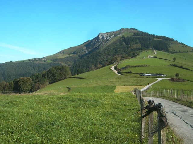 Tolosaldeko Uzturre mendia.